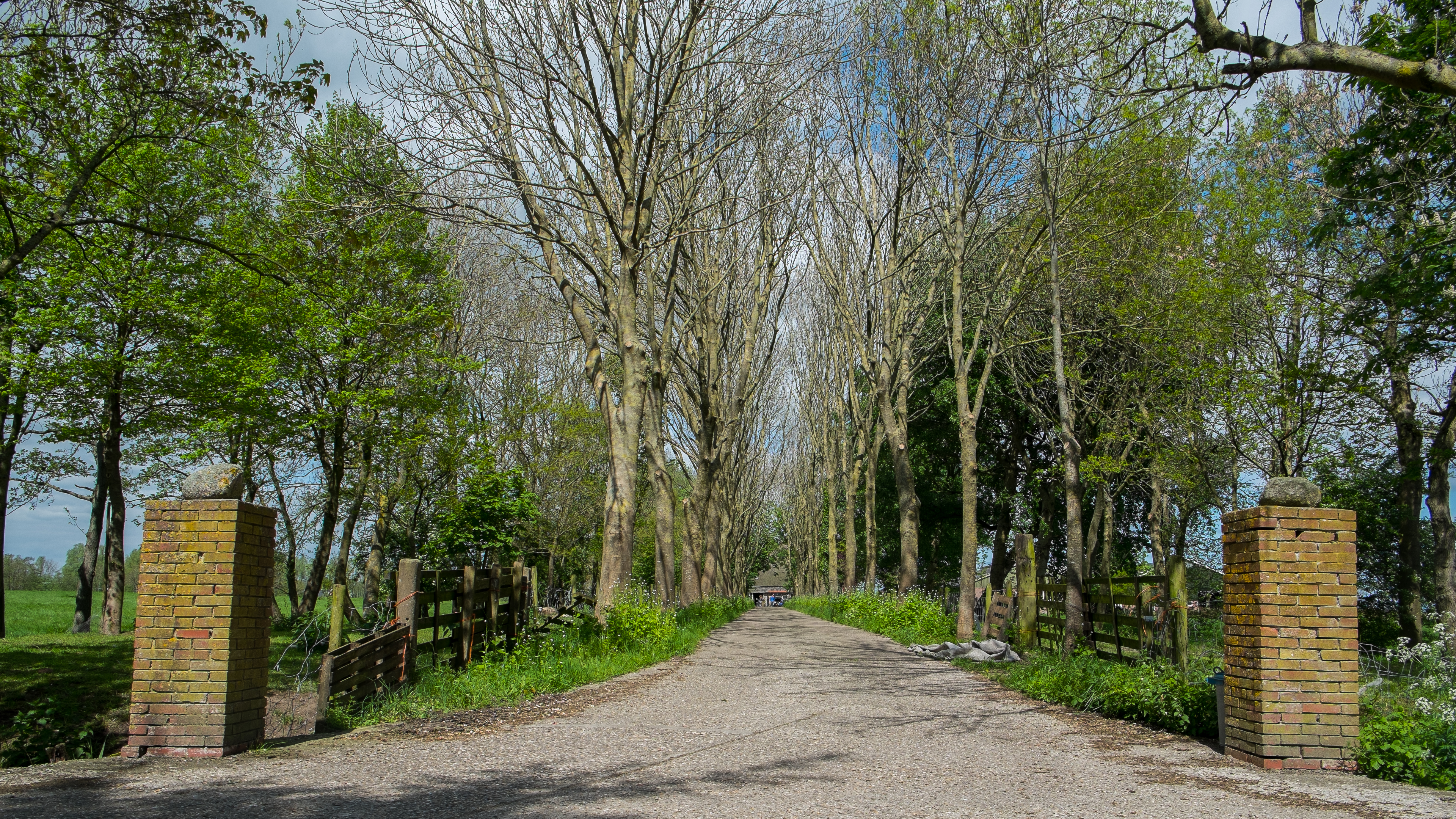 Oprijlaan naar de voormalige Clantstate bij Augsbuurt/Lutjewolde